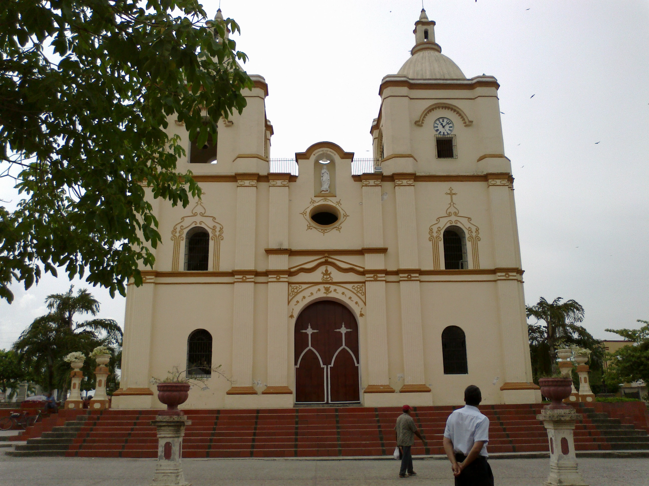 Iglesia en San Onofre de Torobé en Sucre, Colombia.